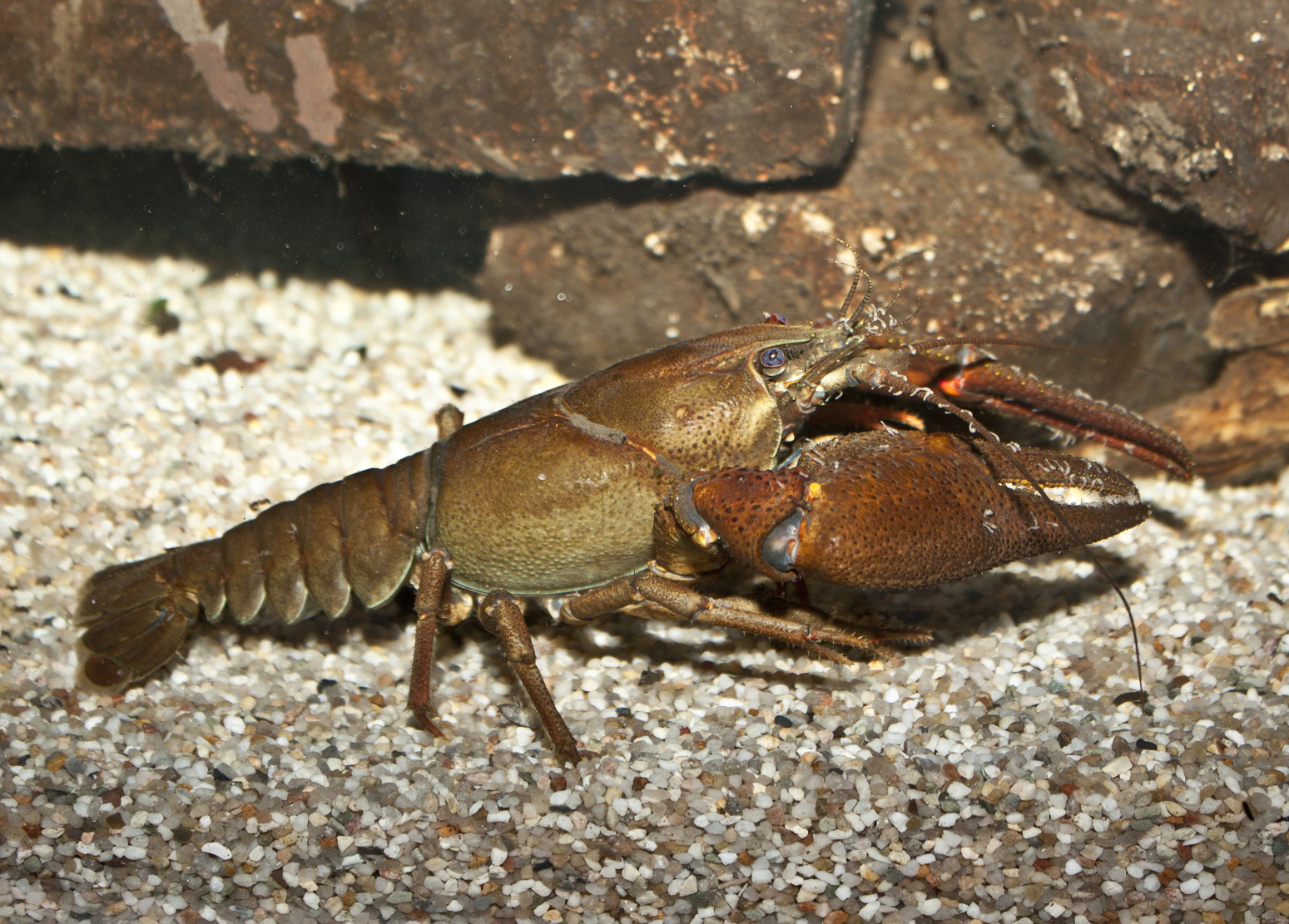 Ein Männchen des Edelkrebses, ausgewachsen